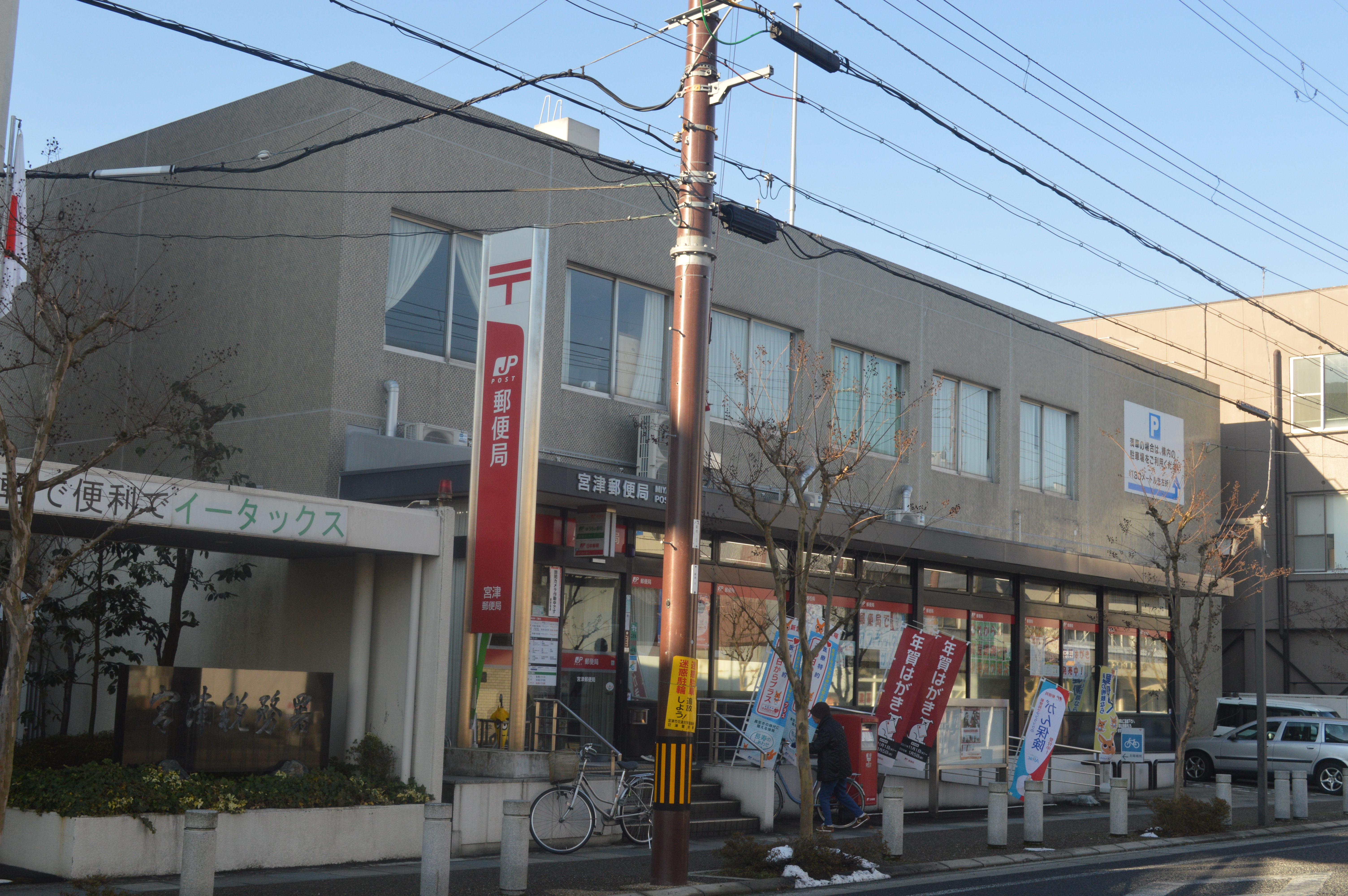 京都府宮津市にある宮津郵便局。